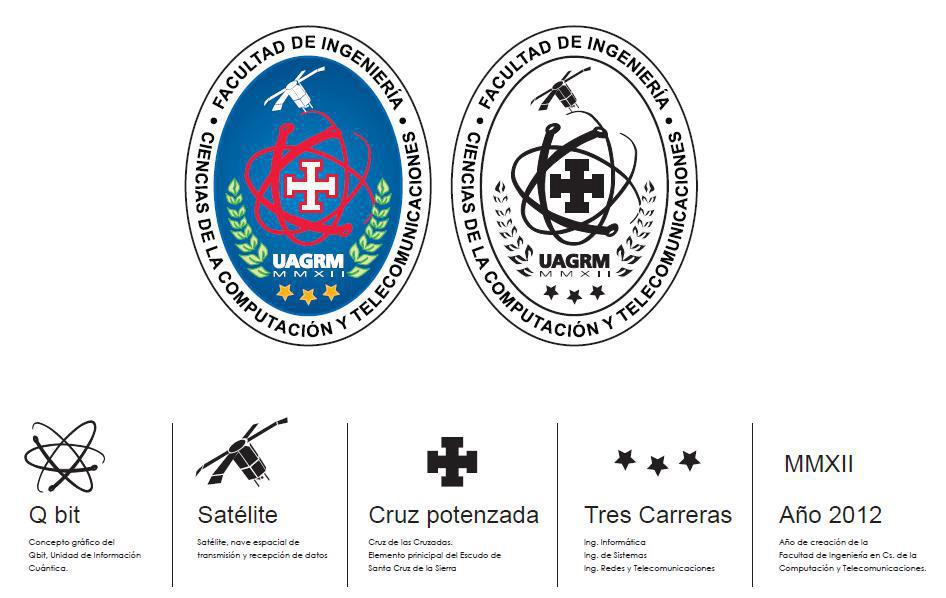 Descripción del escudo de la Facultad de Ingeniería en Ciencias de la Computación y Telecomunicaciones de la Universidad Autónoma Gabriel René Moreno